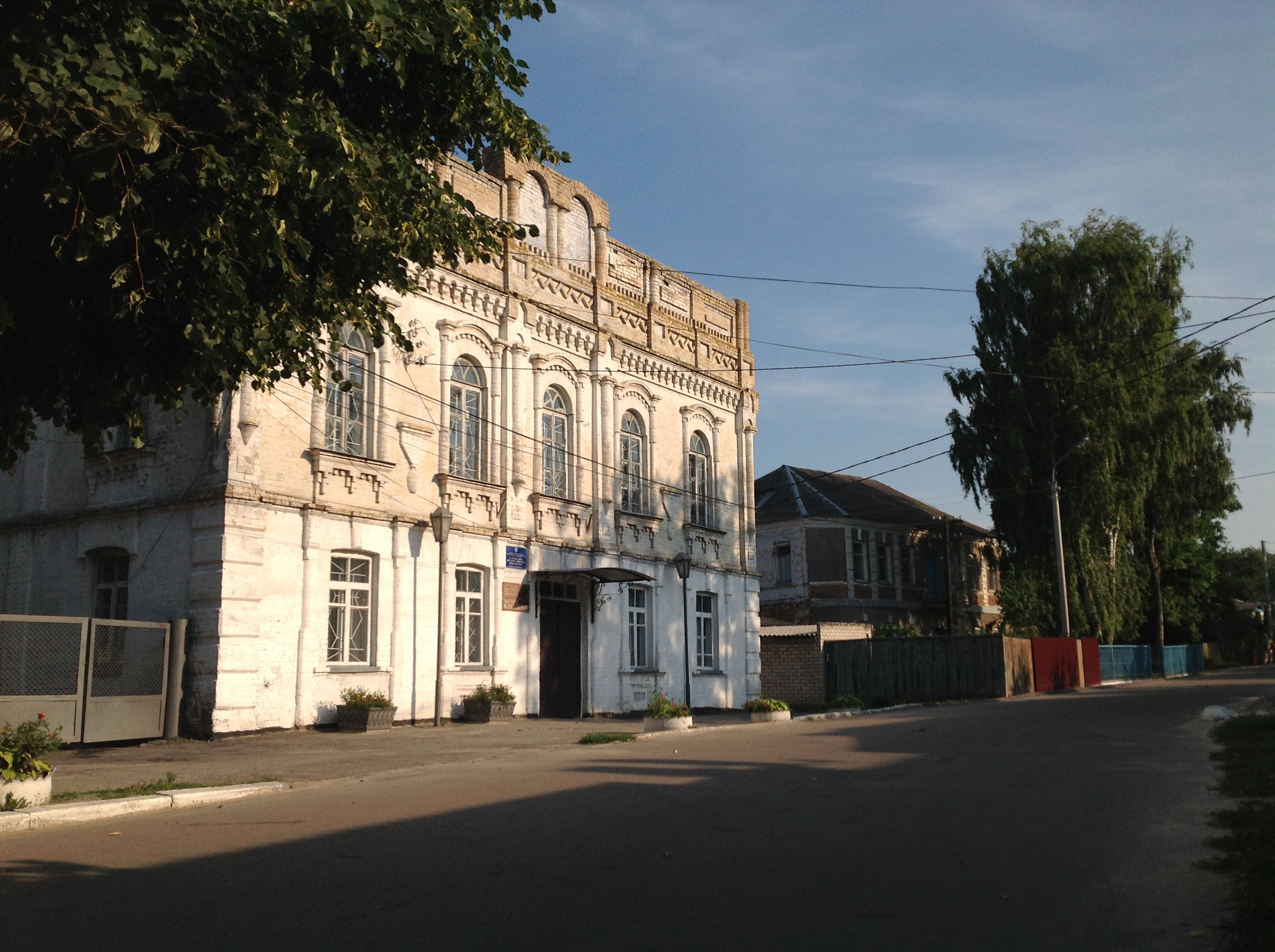 Синагога (мур.), Канів, вул. Воровського, 51